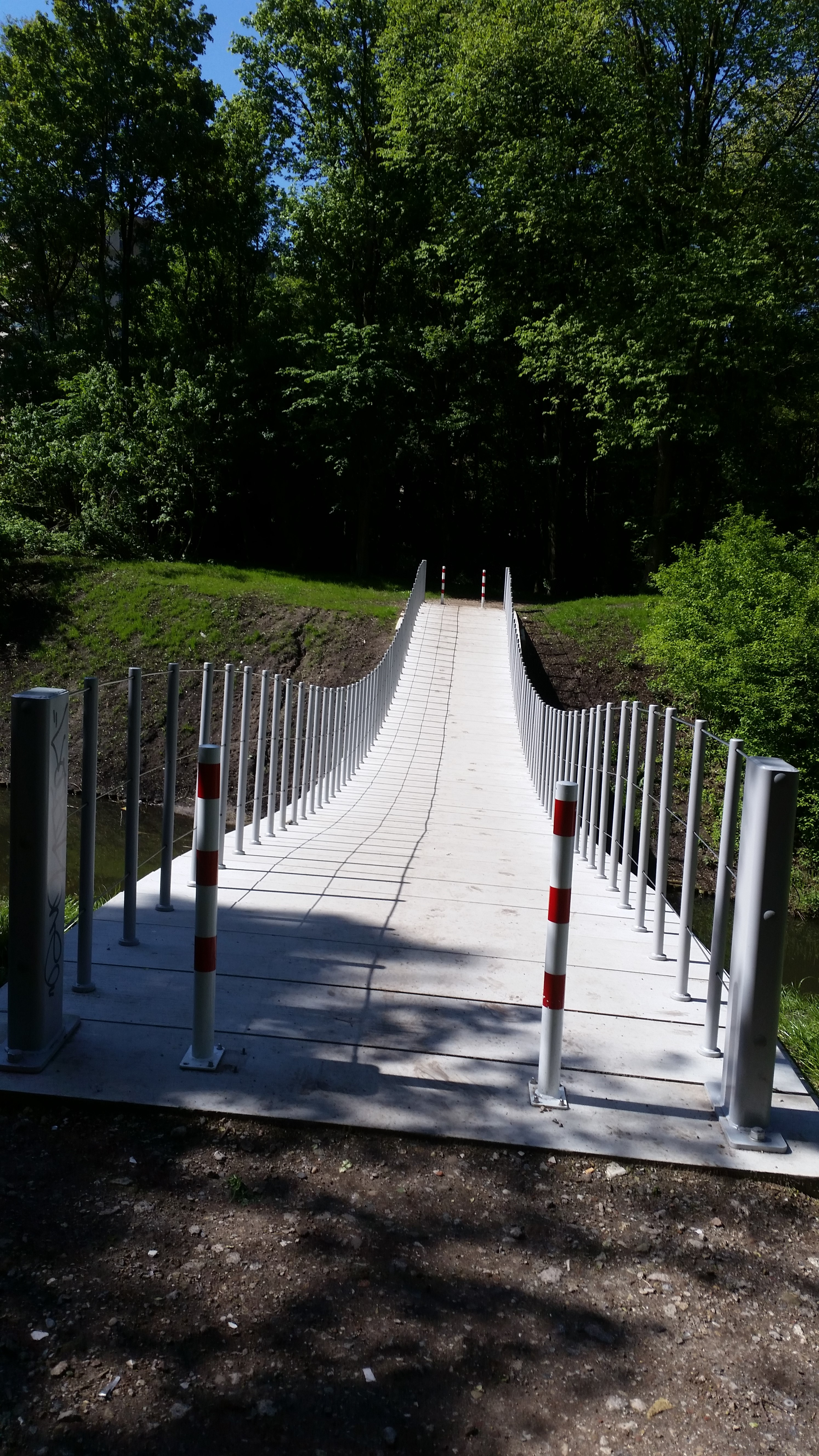 Brug 2400 in het Rembrandtpark, Amsterdam, in lengterichting